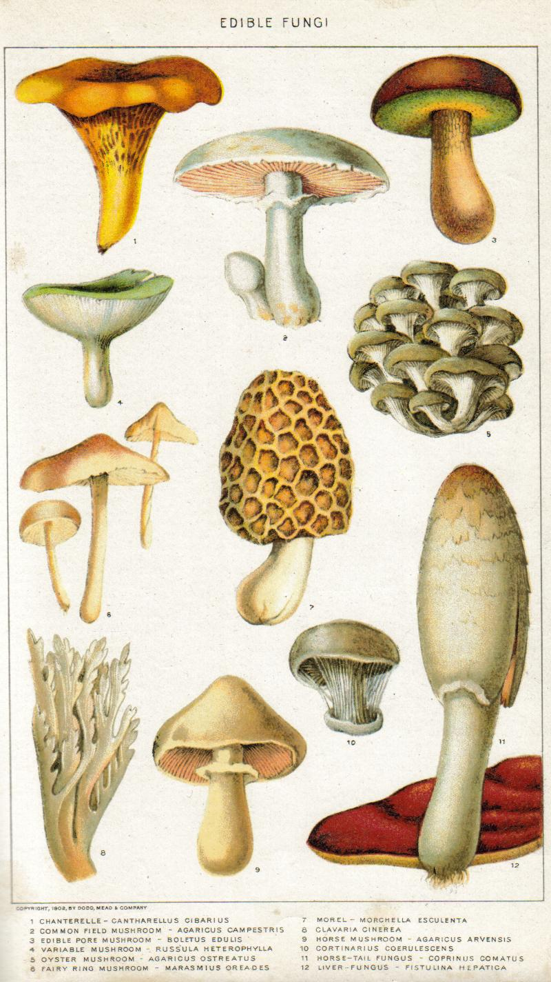 Painting